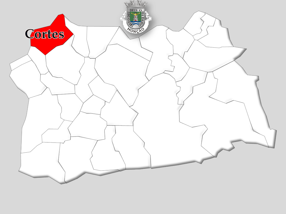 Censos 1864/2011